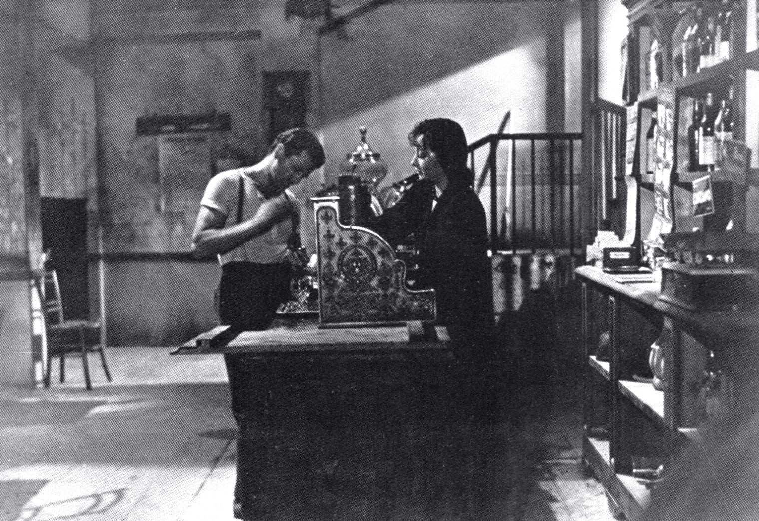 Fotogramma di Ossessione, regia di Luchino Visconti, produz ICI Roma, 1943 con Massimo Girotti e Clara Calamai